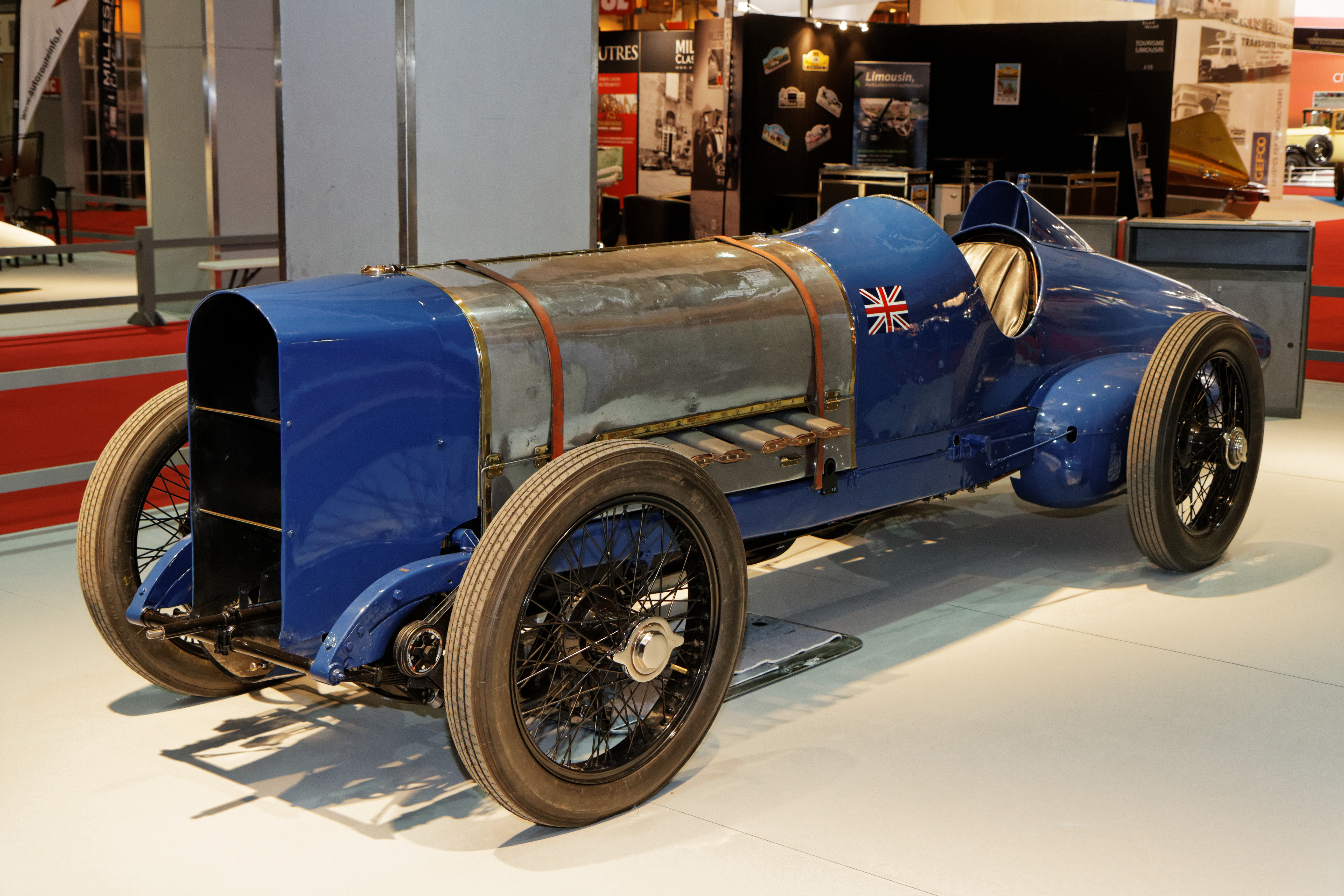 La Sunbeam 350cv exposée lors du salon Retromobile 2014